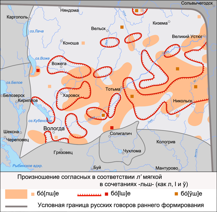 Карта произношения согласных в соответствии л мягкой в сочетании -льш- в вологодских говорах. Источники: Захарова К. Ф., Орлова В. Г., Сологуб А. И., Строганова Т. Ю. Образование севернорусского наречия и среднерусских говоров / Ответственный редактор В. Г. Орлова. — М.: «Наука», 1970. — С. 270 (Карта 79. Судьба сочетания льш)